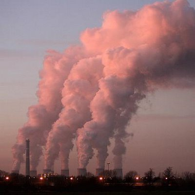 Poluição atmosférica